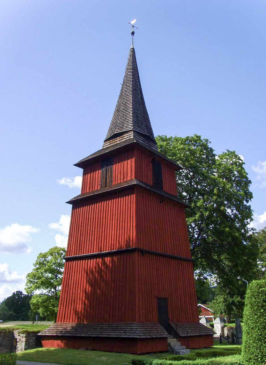 Skönberga kyrka saknar torn, de tre kyrkklockorna - gjutna 1572, 1662 och 1928 - hänger i klockstapeln.